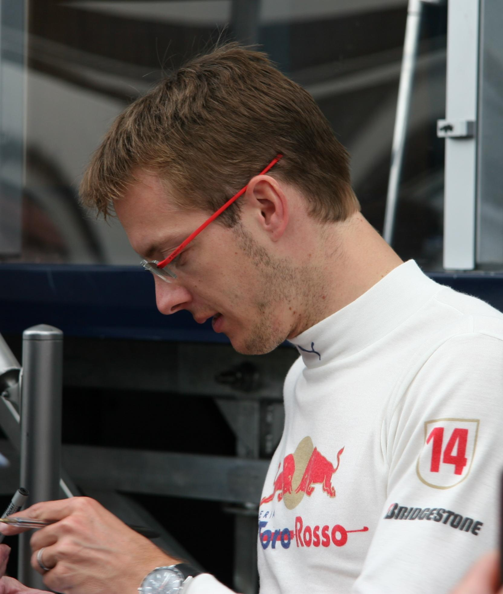 Sébastien Bourdais at Silverstone in 2008.